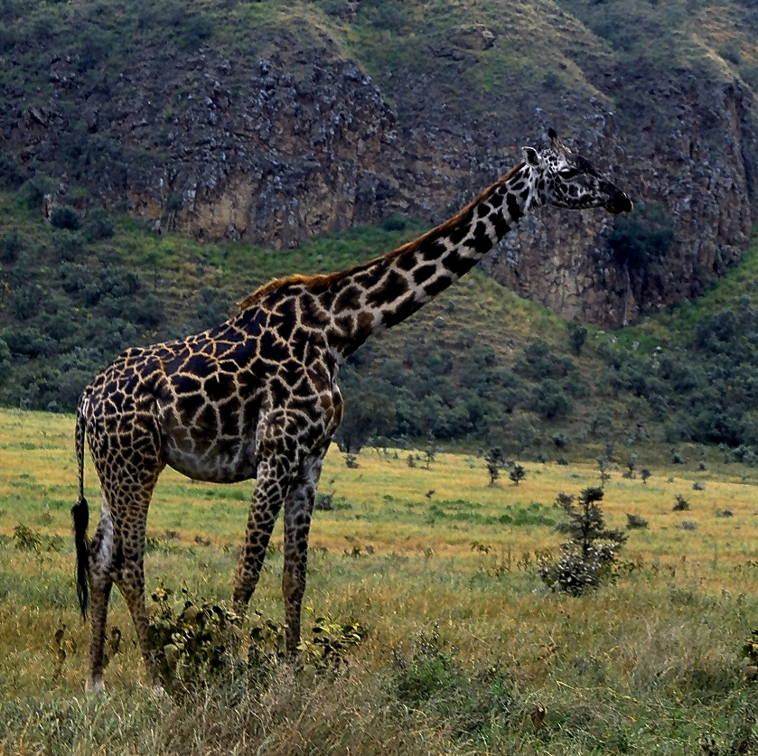 A Maasai giraffe (Giraffa camelopardalis tippelskirchi) in Hell's Gate National Park, Kenya